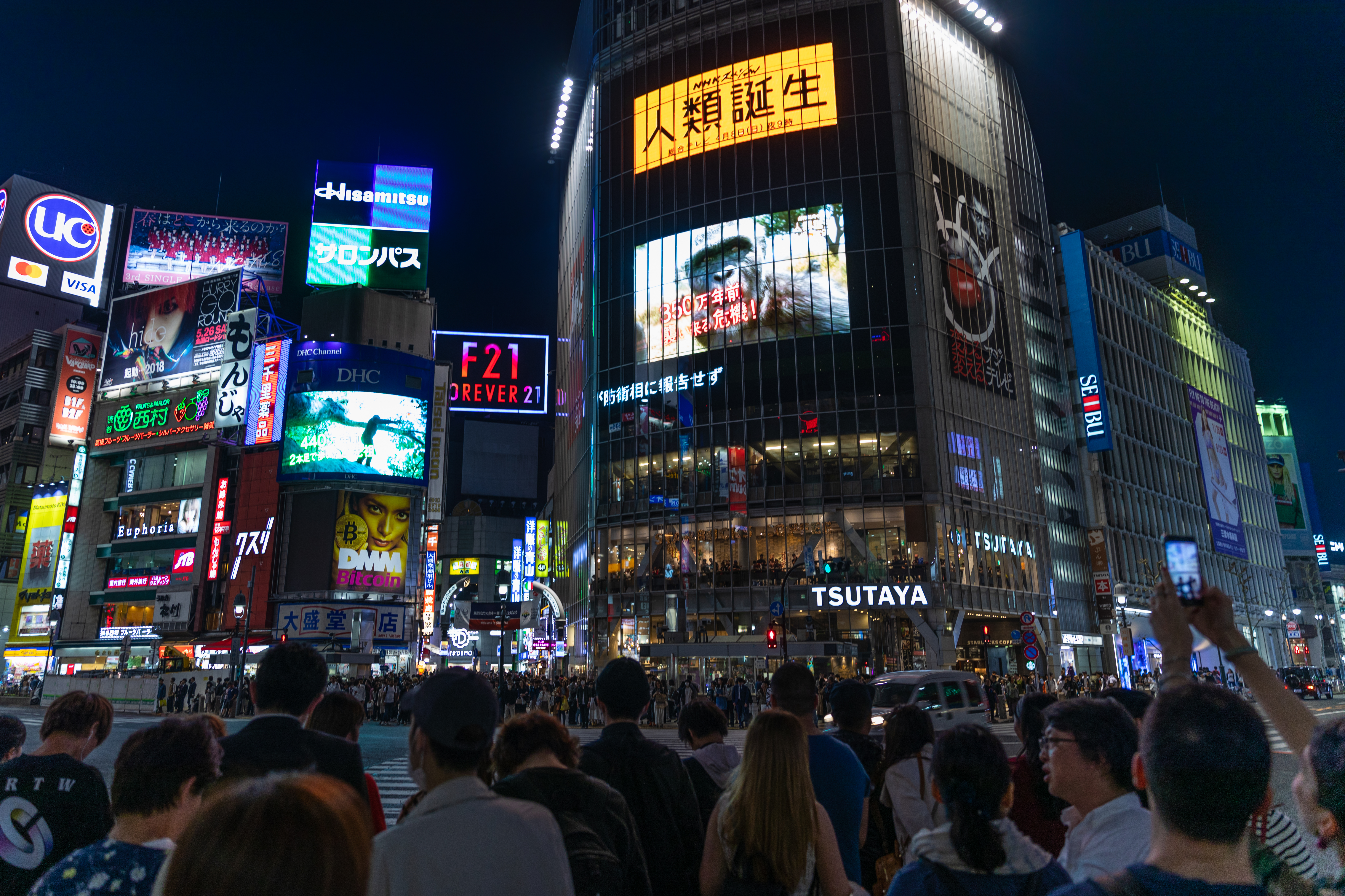 Shibuya crossing - Tokyo, Japan